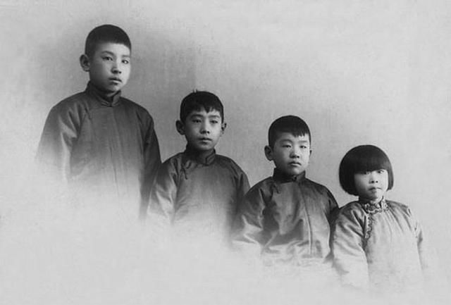 王光傑、王光復、王光英、王光美